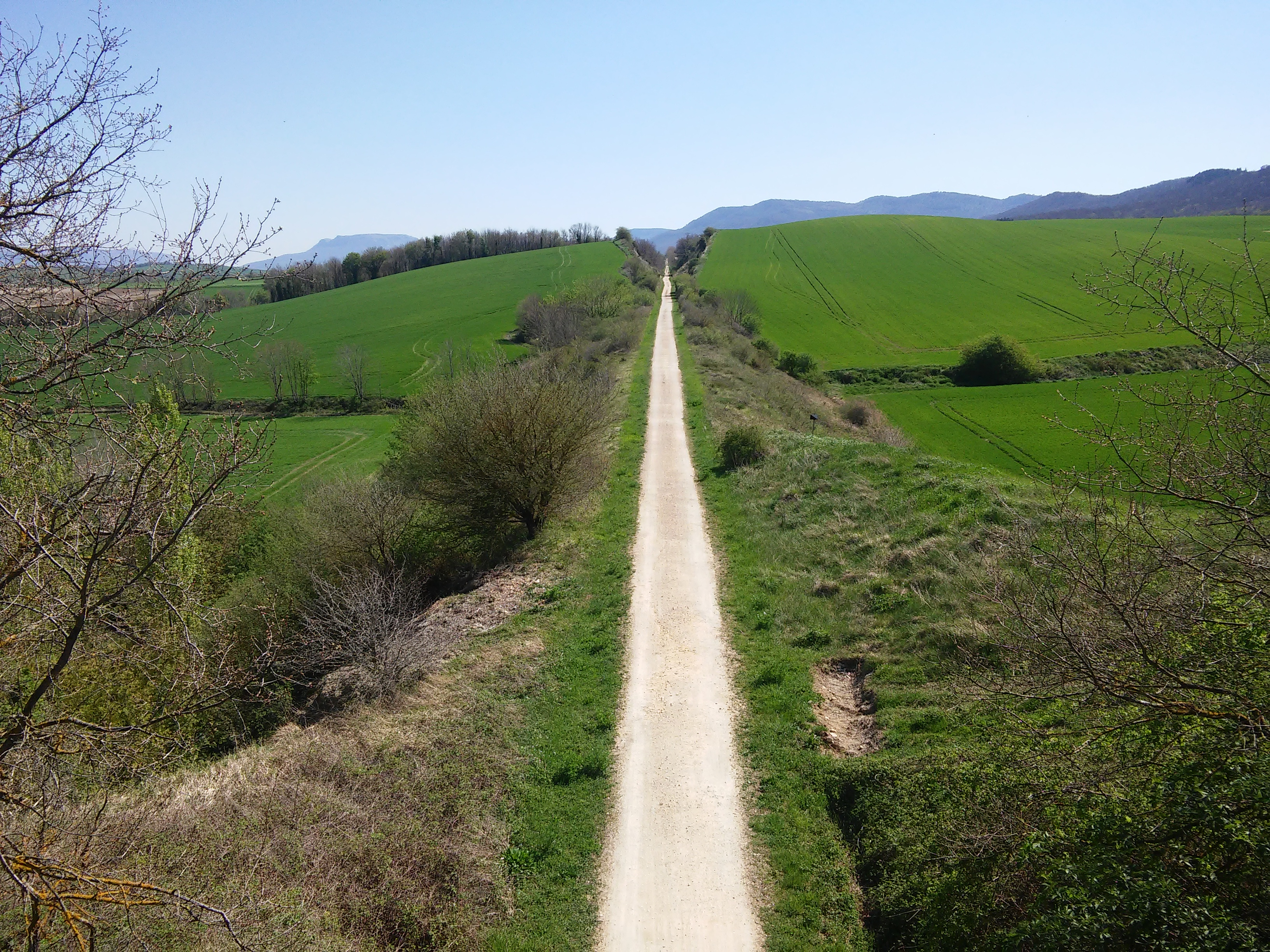 Anglo-Vasco-Navarro bide berdea Erentxun herrian (Araba)